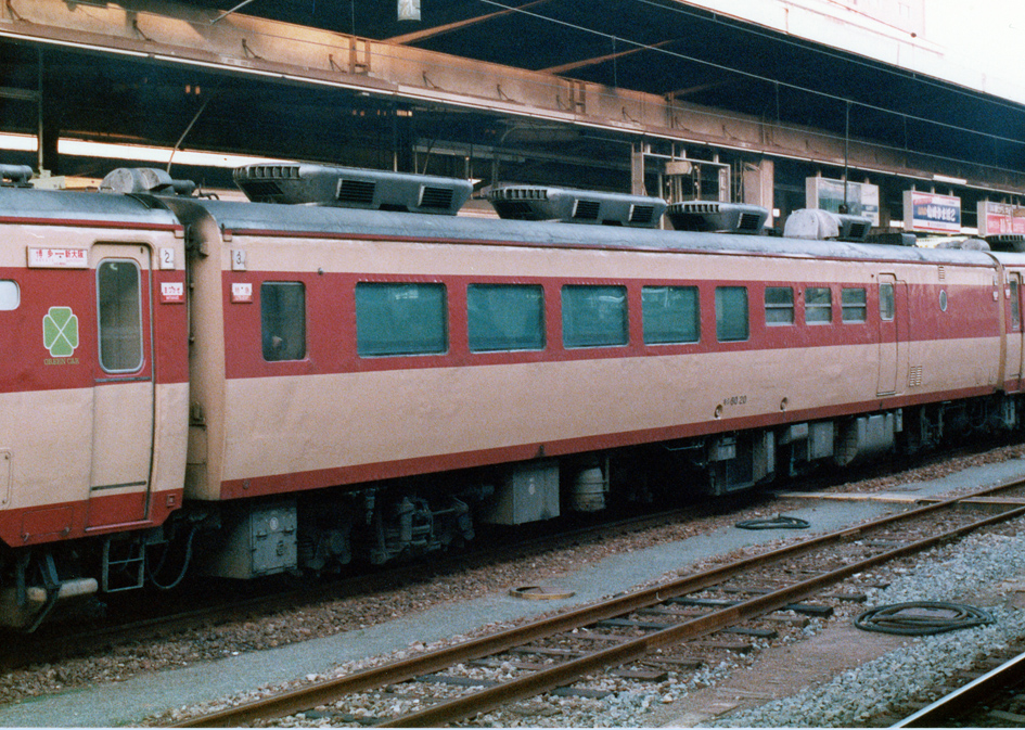 国鉄 キシ80 20